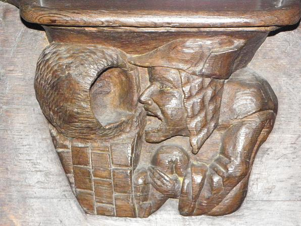 Stalles de la basilique de La Guerche-de-Bretagne (35). Miséricorde.